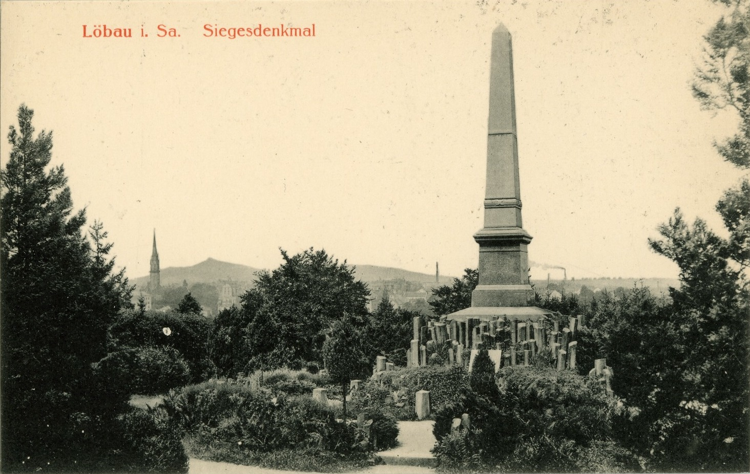 Löbau; Siegesdenkmal This postcard is from publisher Brück & Sohn in Meißen ( This postcard has a unique number 15099 and is available in a higher resolution at the publisher. This images was uploaded in a cooperation project between Wikipedians and the publisher.